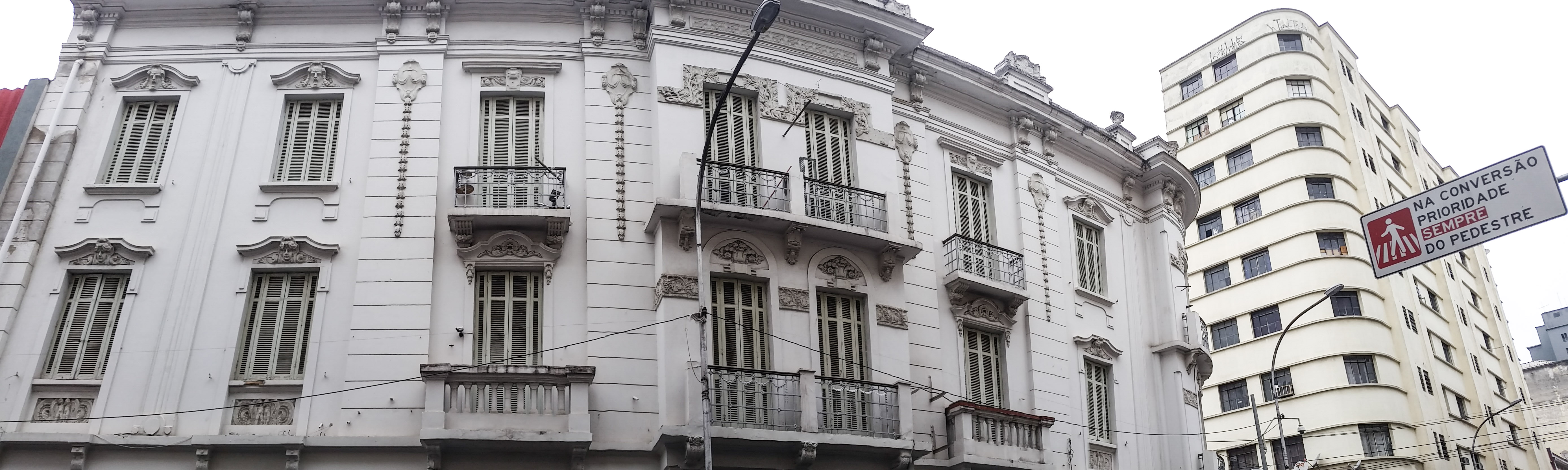 Panorama: fachada do Palacete Helvetia, visto da rua Santa Ifigênia, em São Paulo (SP)